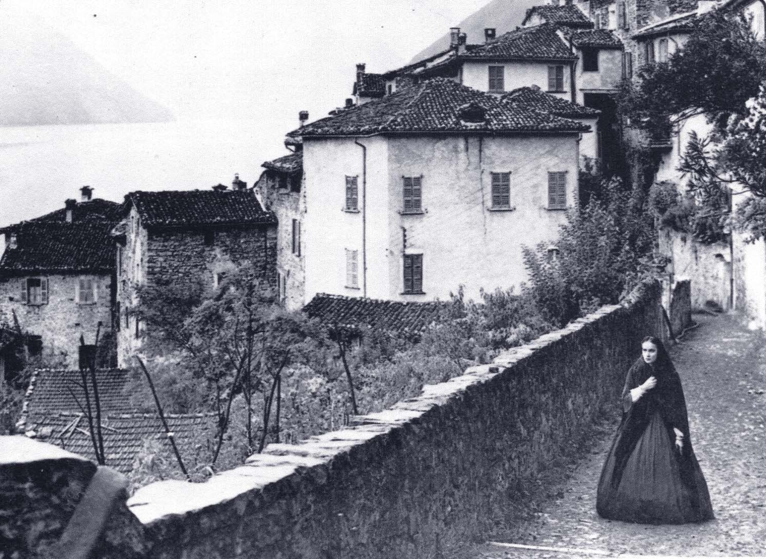 Alida Valli in "Piccolo mondo antico" (Soldati, 1941)